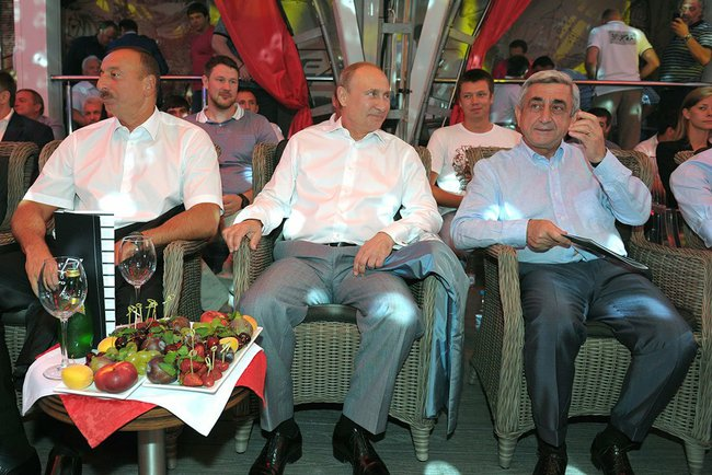 Посещение турнира по боевому самбо. С И.Алиевым (слева) и С.Саргсяном